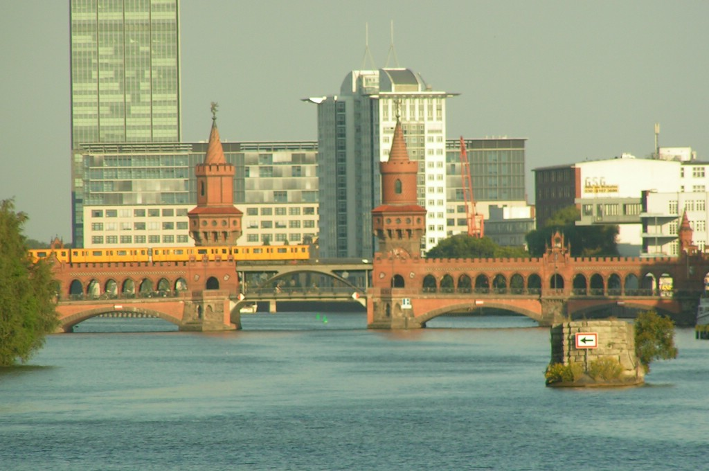 Berlin, Oberbaumbrücke with U-Bahn, taken by David Herrmann, 2004, August 8th